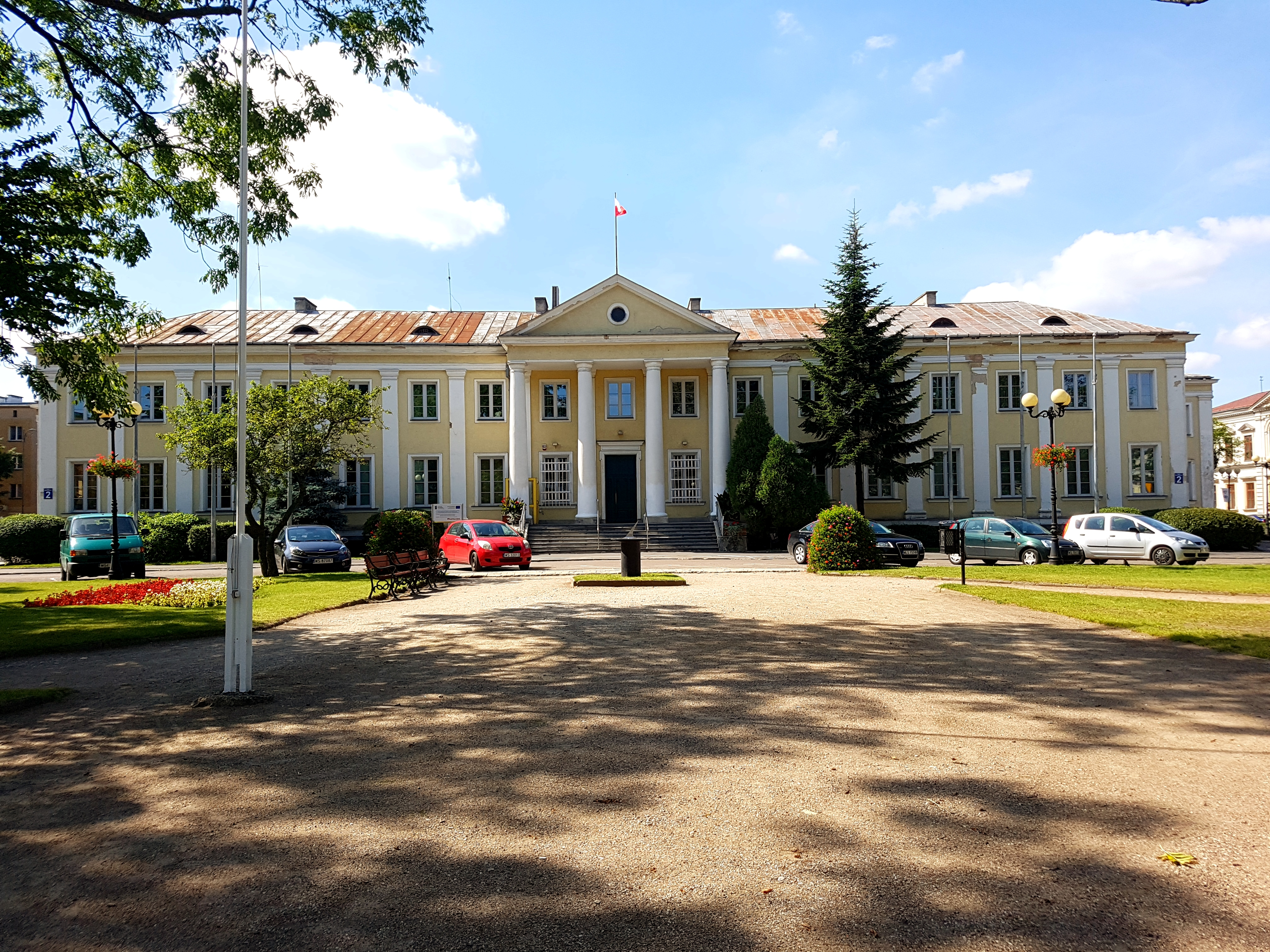 Urząd Miasta Siedlce (2017)